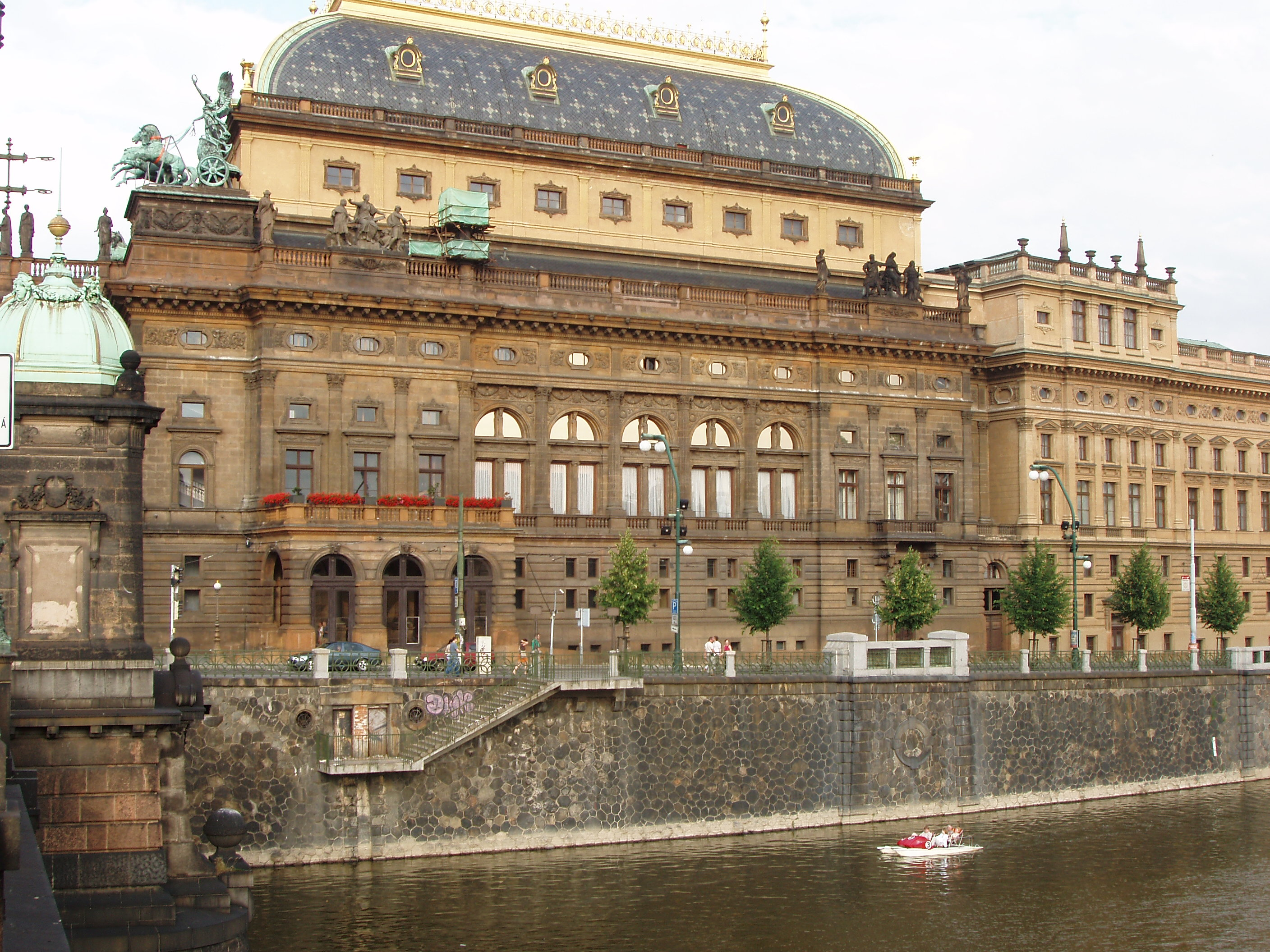 Národní divadlo v Prahe, Česko